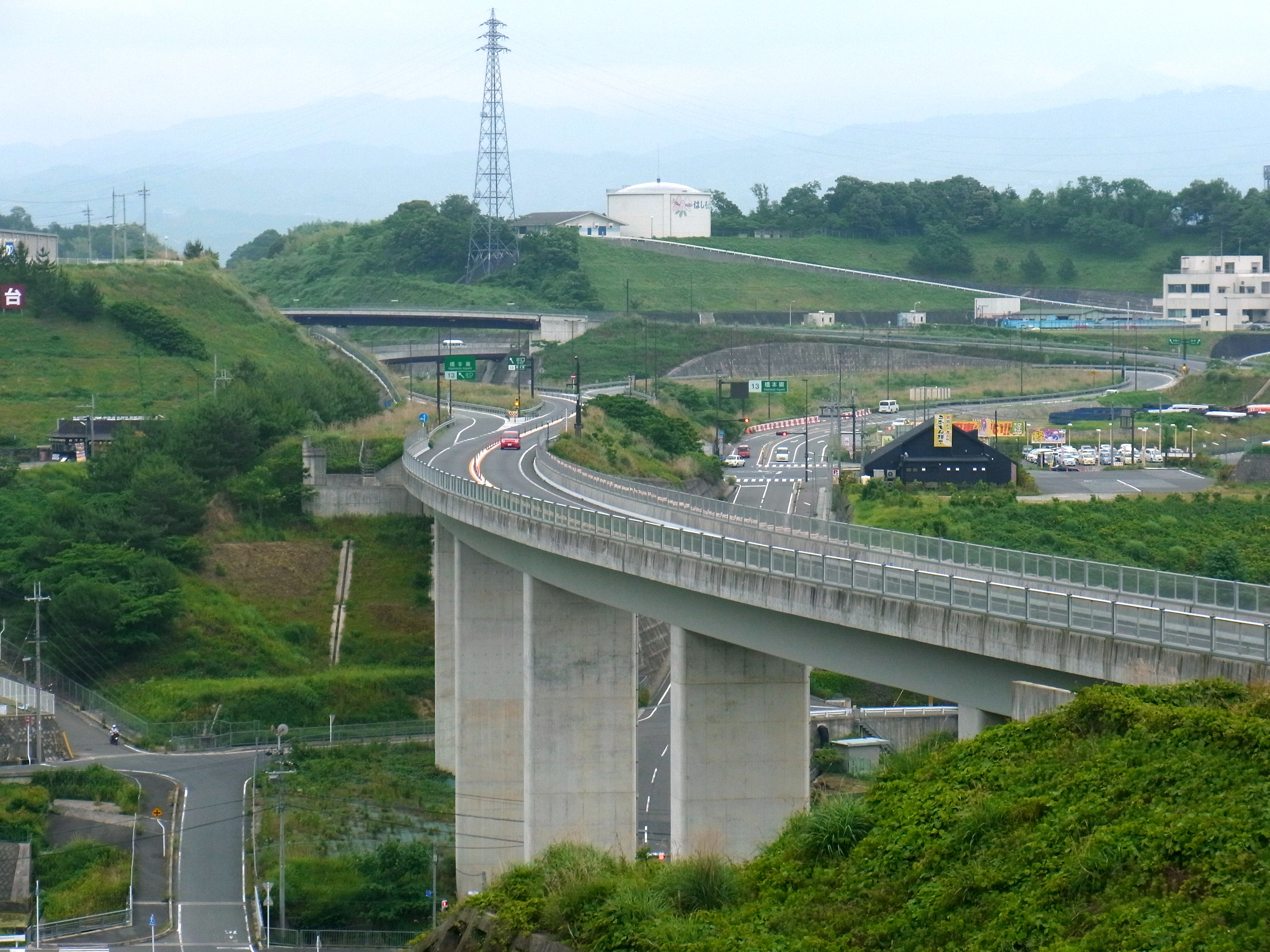 京奈和自動車道の橋本東インターチェンジ Keinawa Expressway 2012.6.11